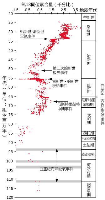 中文（中国大陆）: 新生代时期，全球气温变化图。